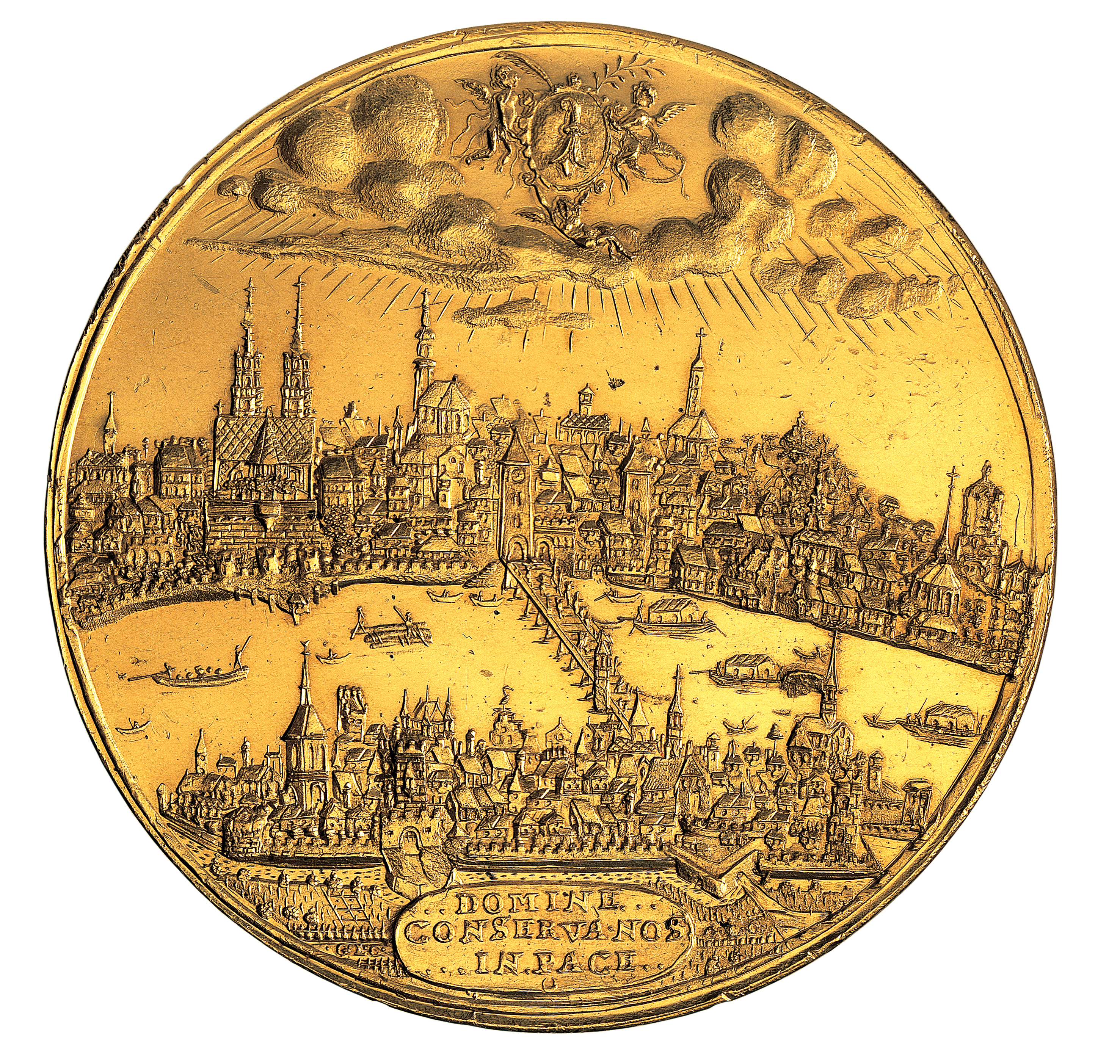 Goldene Basler Geschenkmedaille von 1691, gefertigt von Gabriel Le Clerc, im Münzkabinett des Historisches Museum Basel